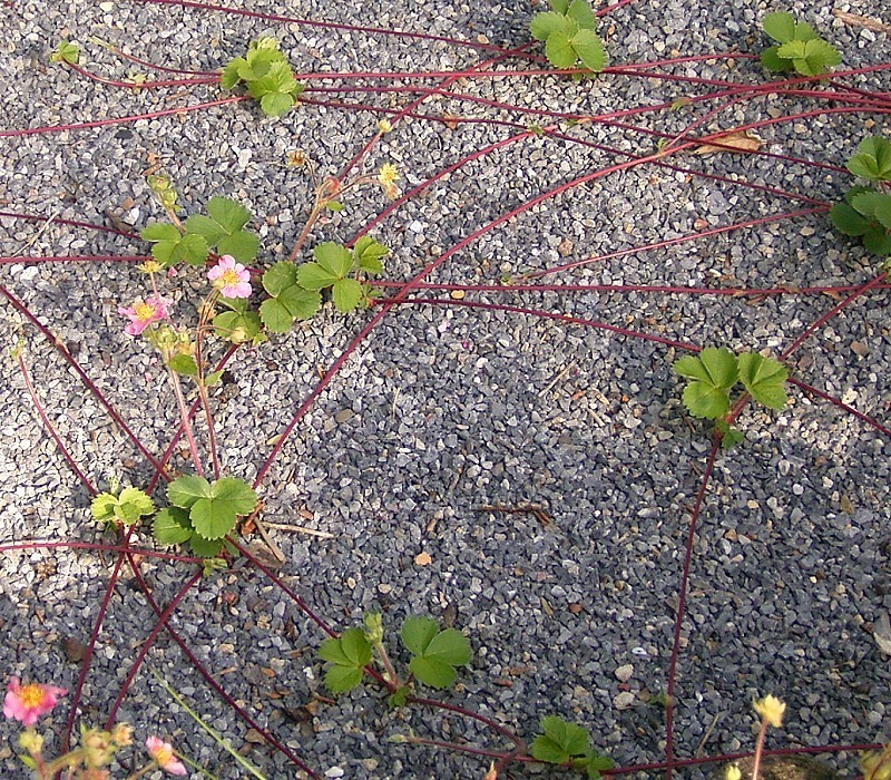 Fragaria × ananassa (Fragaria virginiana × Fragaria chiloensis) × Comarum palustre 'Pink Panda'